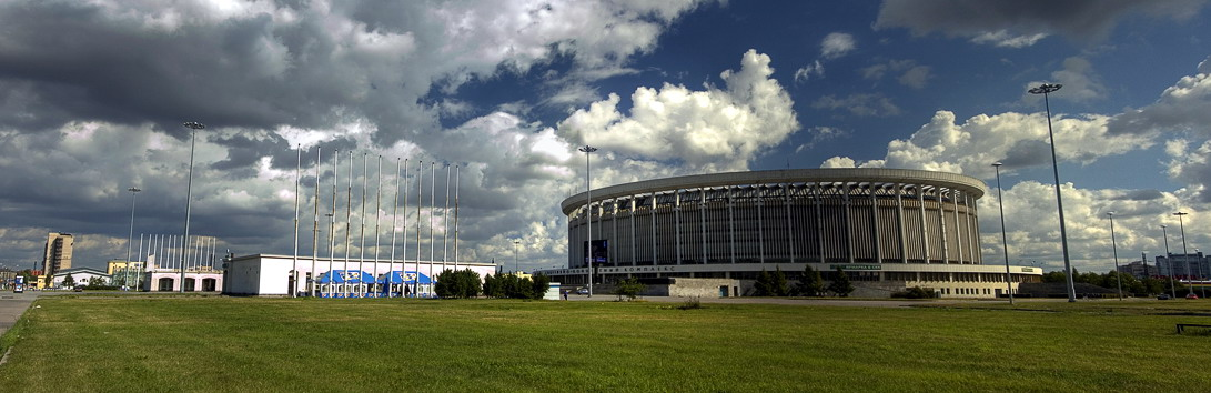 Вид на СКК